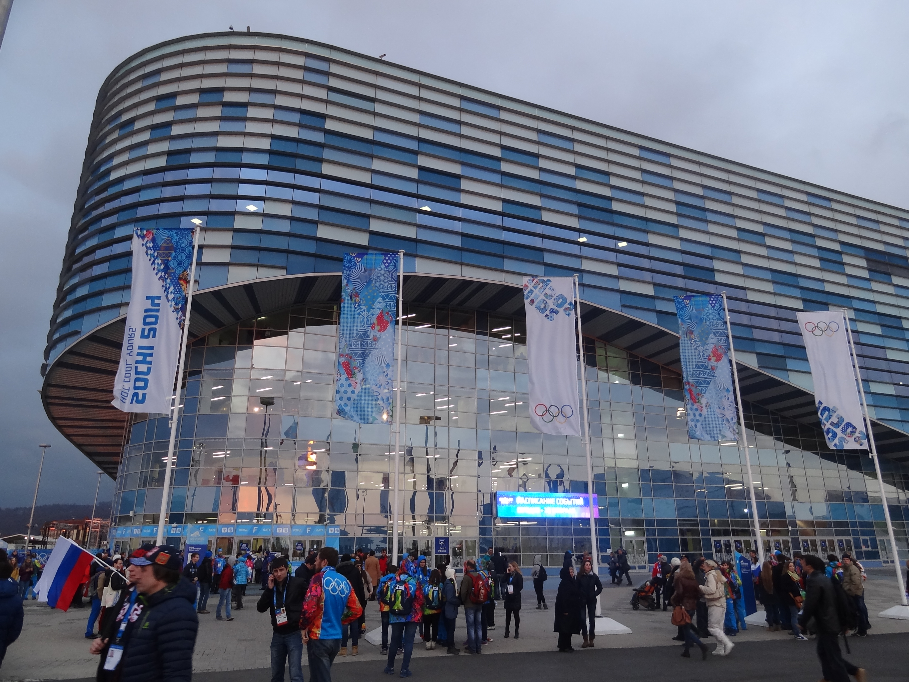 Дворец зимнего спорта «Айсберг» — ледовый дворец спорта в Сочи, Адлер.